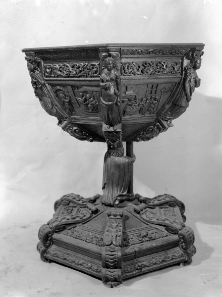 Dopfunt, 1600-tal. Kategori: (04) DopfuntarDopfunt, 1600-tal.